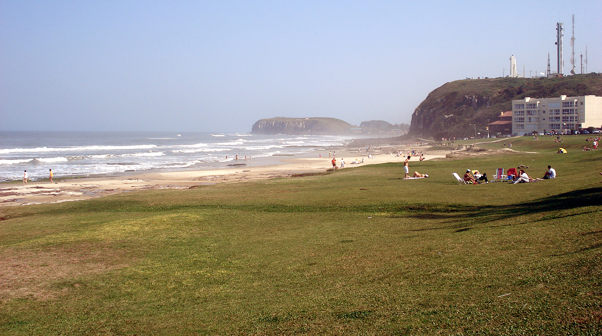 Prainha, em Torres, Brasil.